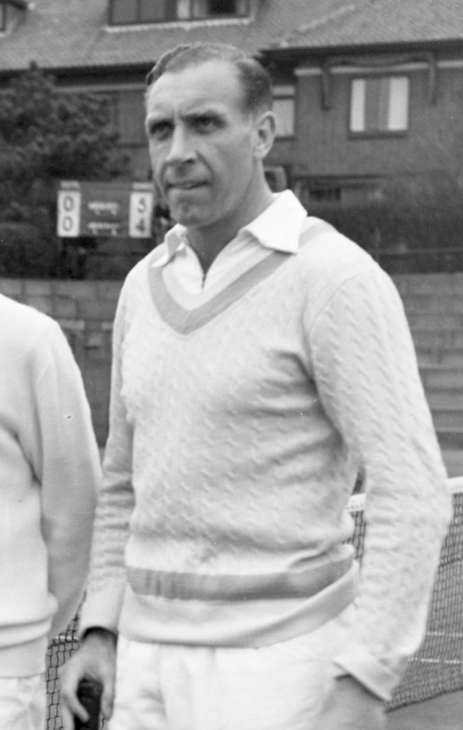 Van Swol op Marlot